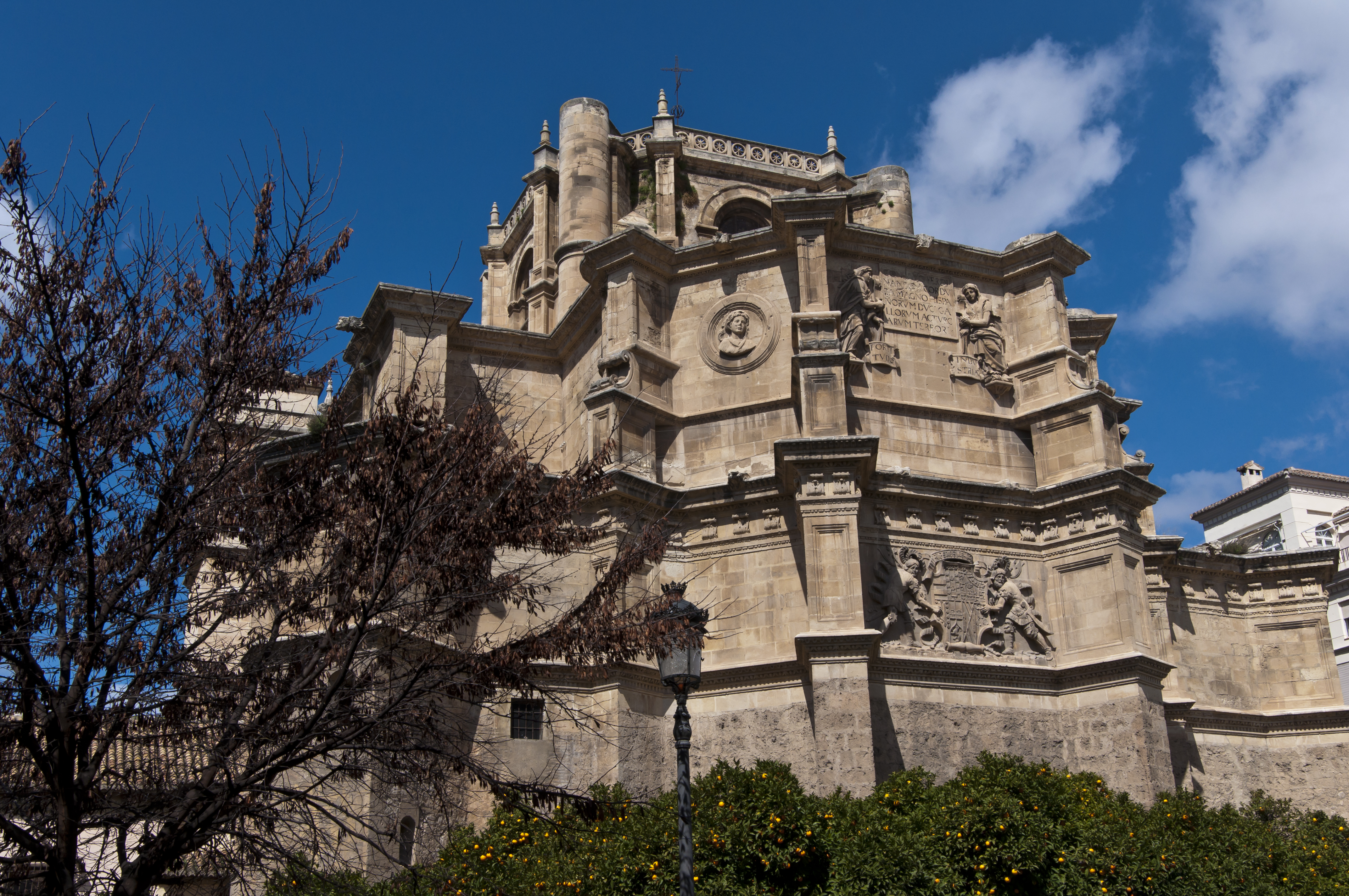 Het klooster van Hiëronymus te Granada, Spanje.